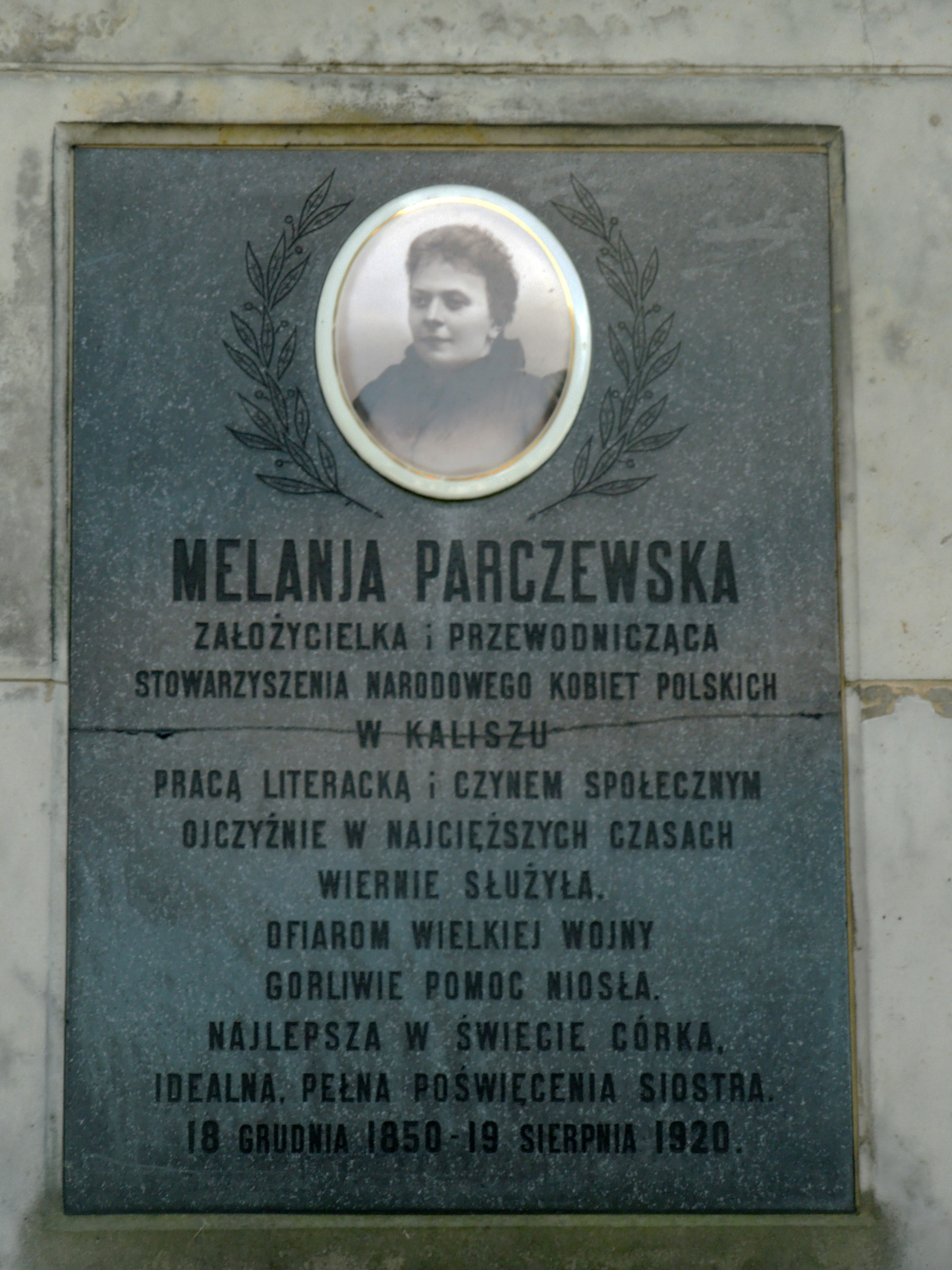 Nagrobek Melanii Parczewskiej na kaliskim cmentarzu rzymskokatolickim